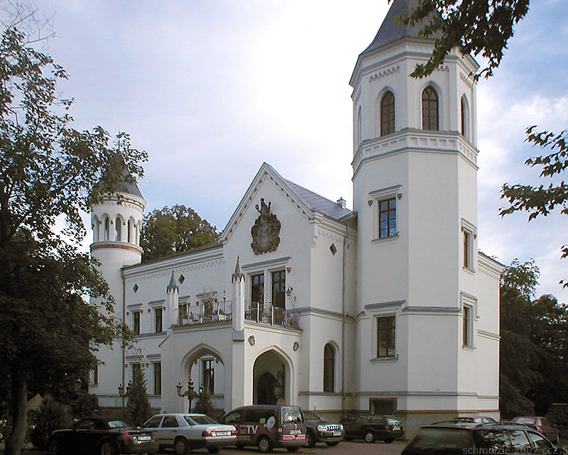 Schloss in Bredenfelde, Mecklenburg-Vorpommern, Deutschland